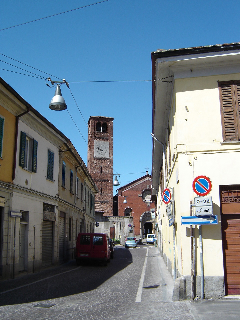 La chiesa vecchia di Baggio. Autore: Riccardo De Benedictis